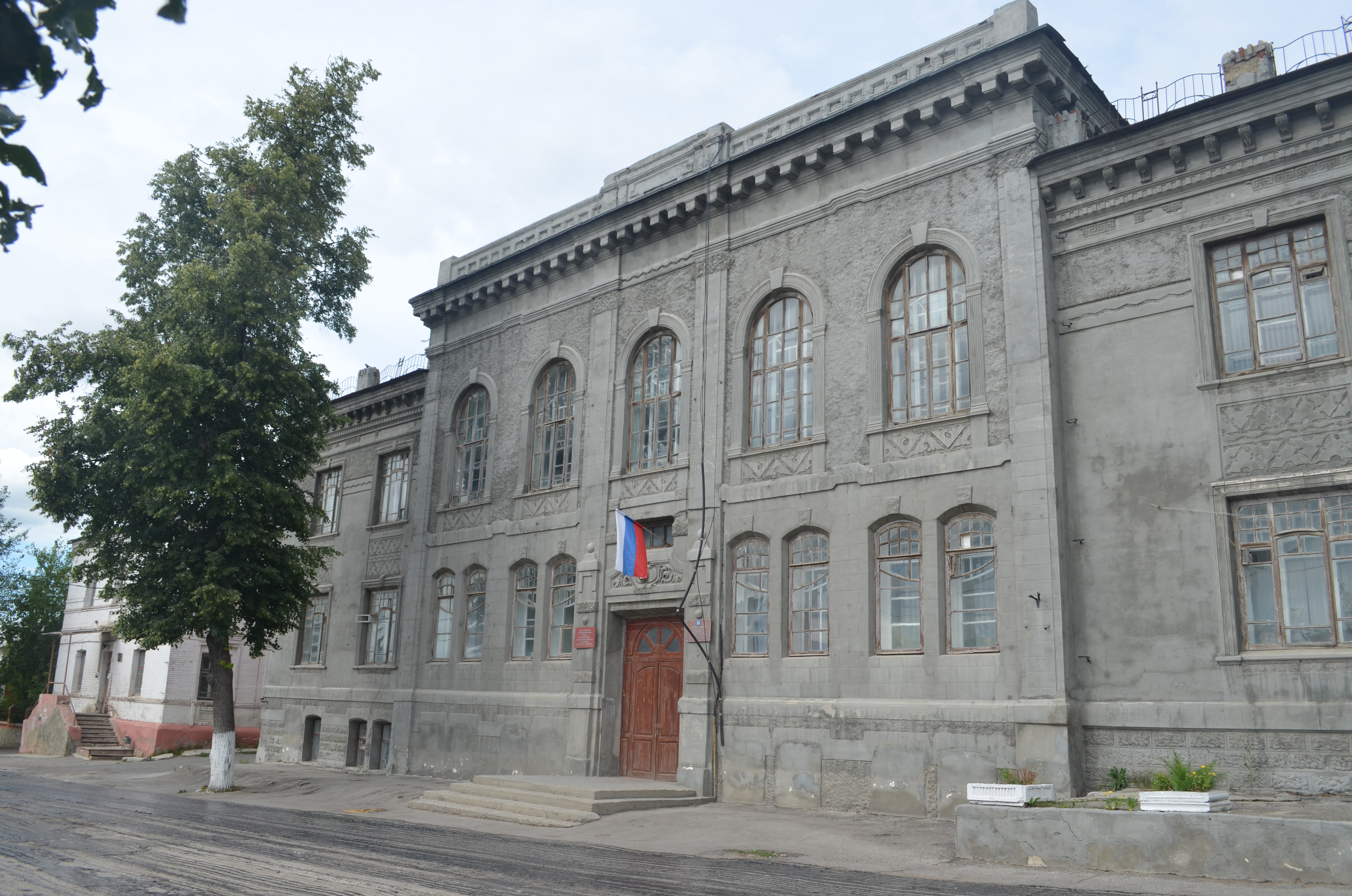 Здание администрации города Михайлов (1912)